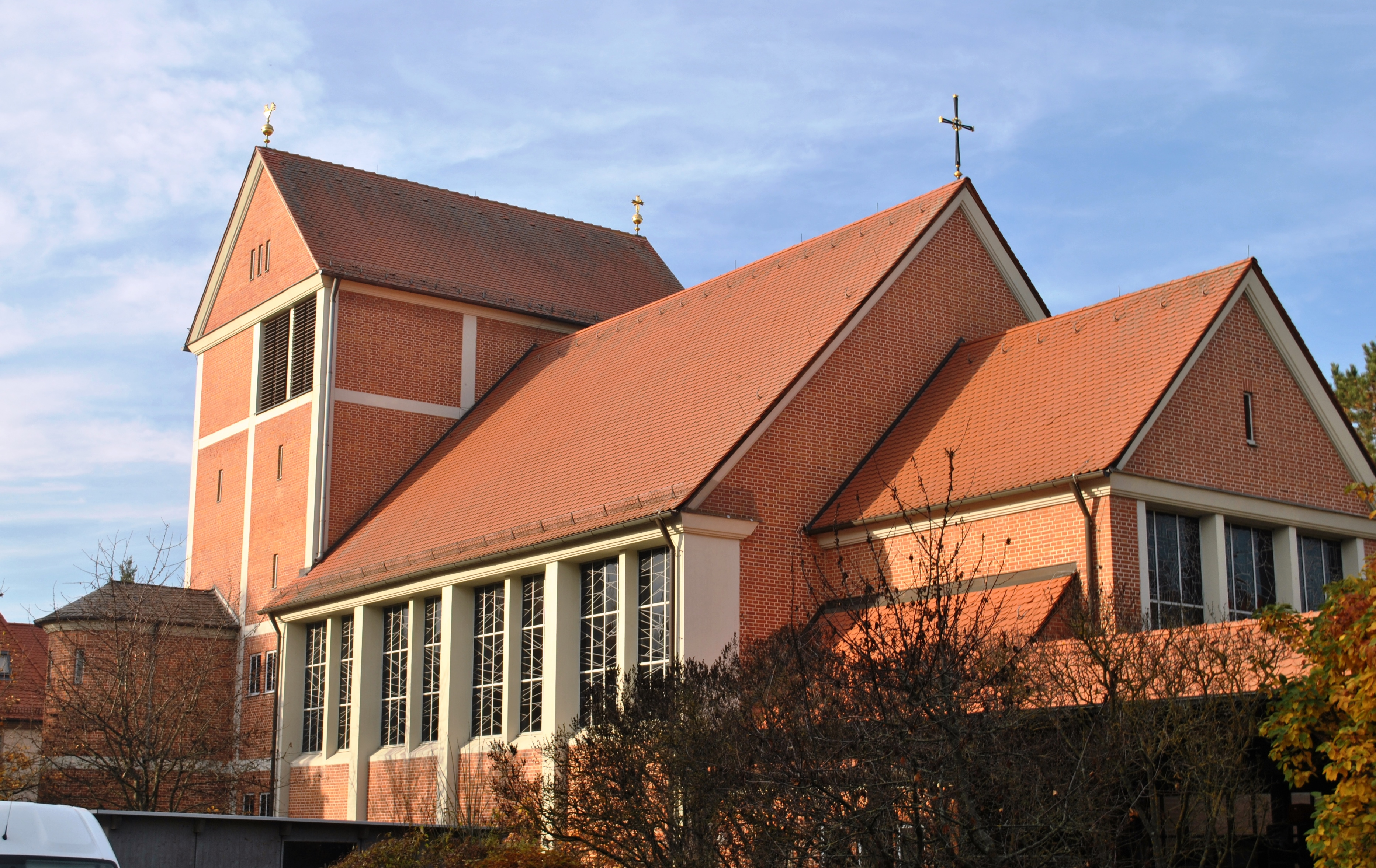 Evangelisch-Lutherische Friedenskirche Kitzingen-Siedlung